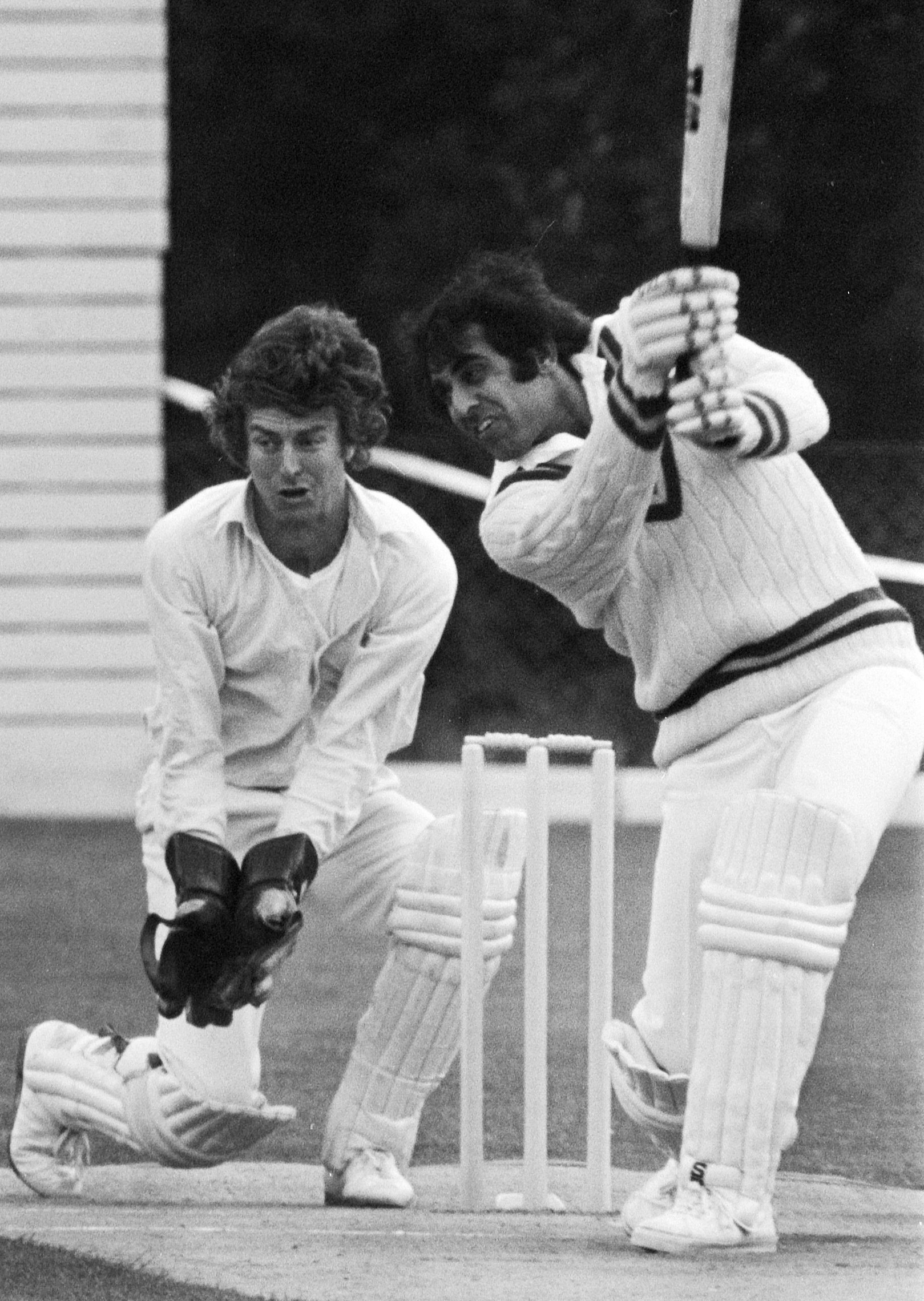 Cricket Nederland tegen Pakistan; Haroon Rashid van Pakistan aan bat, achter hem de Nederlandse cricketkeeper Renee Schoonheim